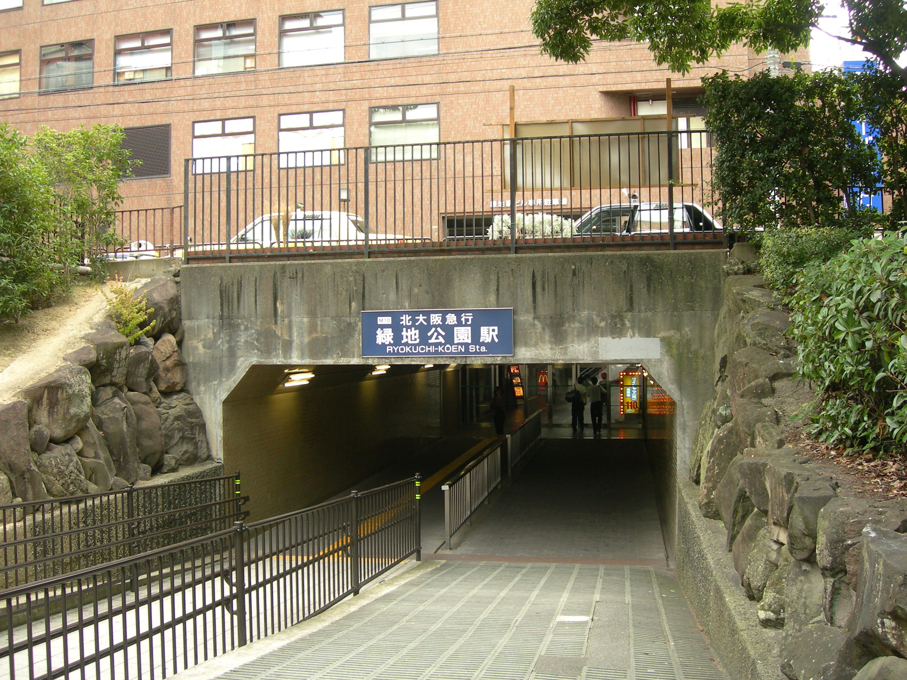 緑地公園駅東口